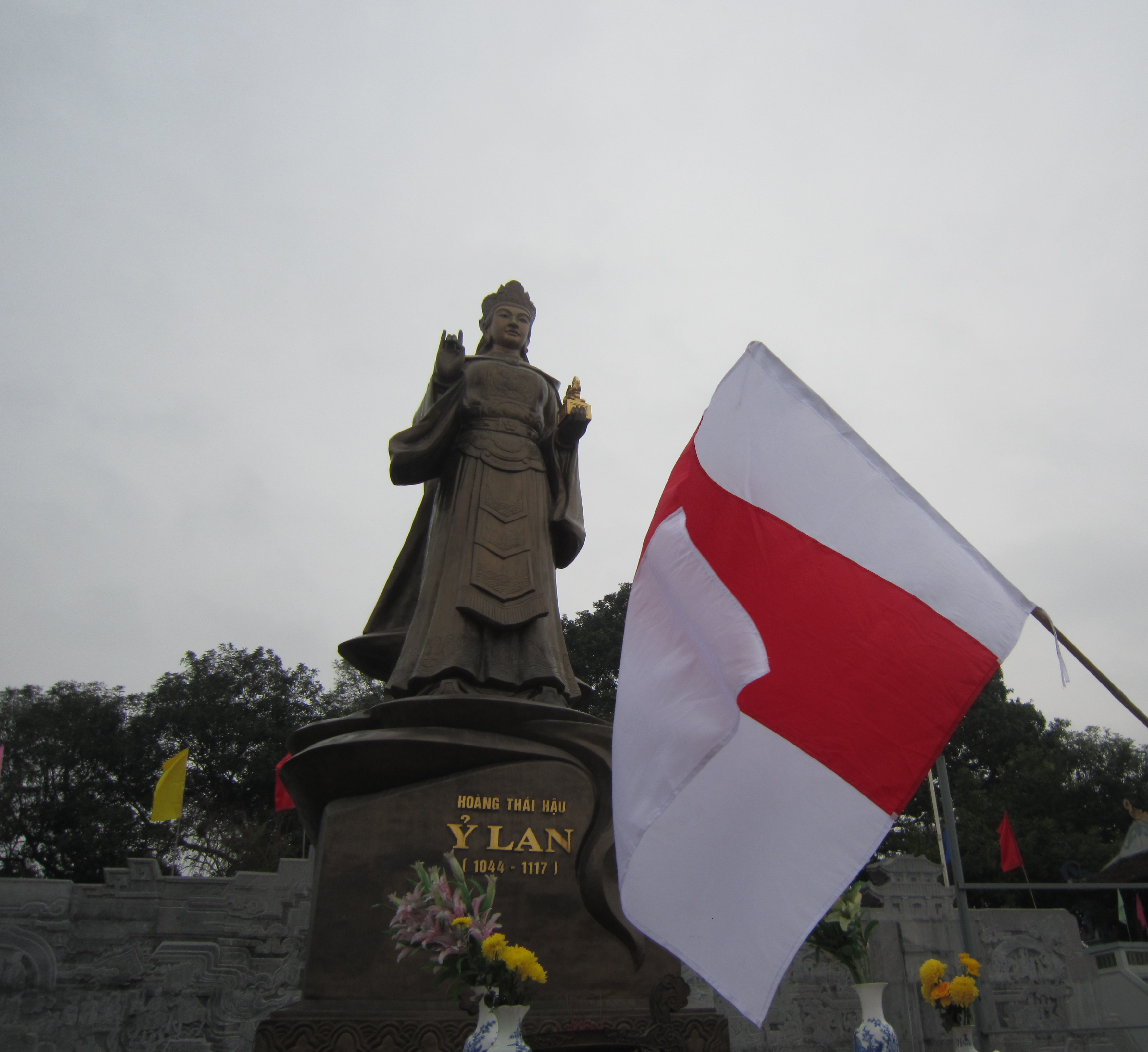 The human flag at Statue of Queen Mother Ỷ Lan, 2013.